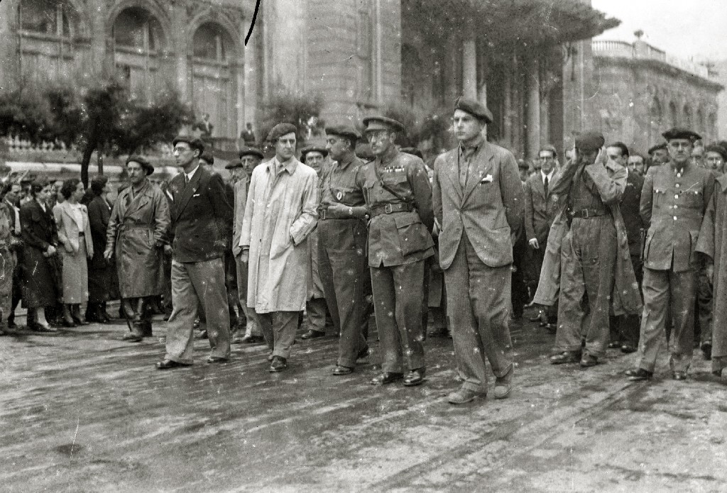 Título original: Entrada de las tropas nacionales en San Sebastián (41/54) Localización: San Sebastián (Guipúzcoa)